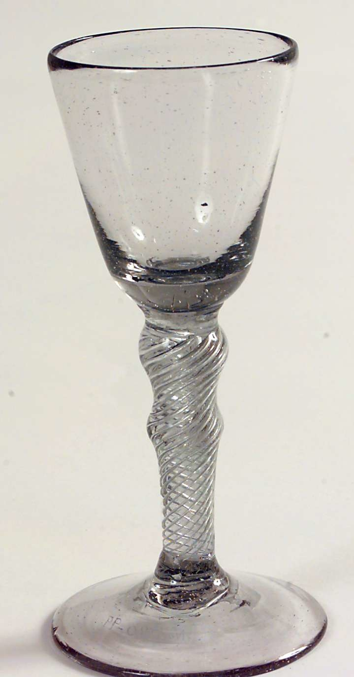 Drammeglass prodisert på Nøstetangen glassverk. Høyde 13 cm. Foto Anne-Lise Reinsfelt / Norsk Folkemuseum, NF.1899-0390.